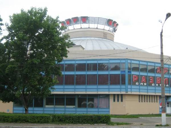 Tver circus